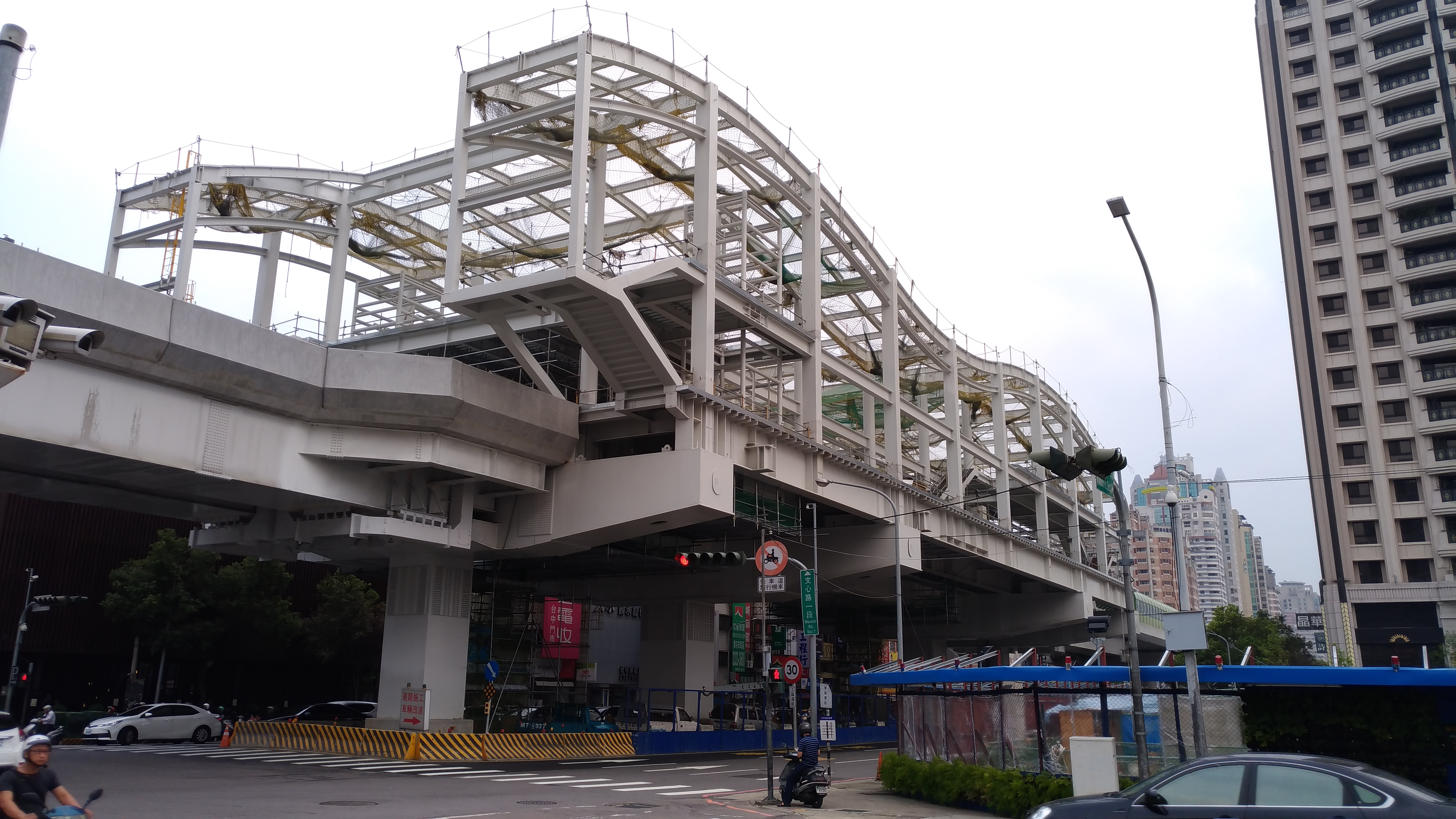 臺中捷運G10站2017年4月工程